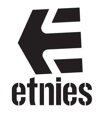 LOGO DE Etnies